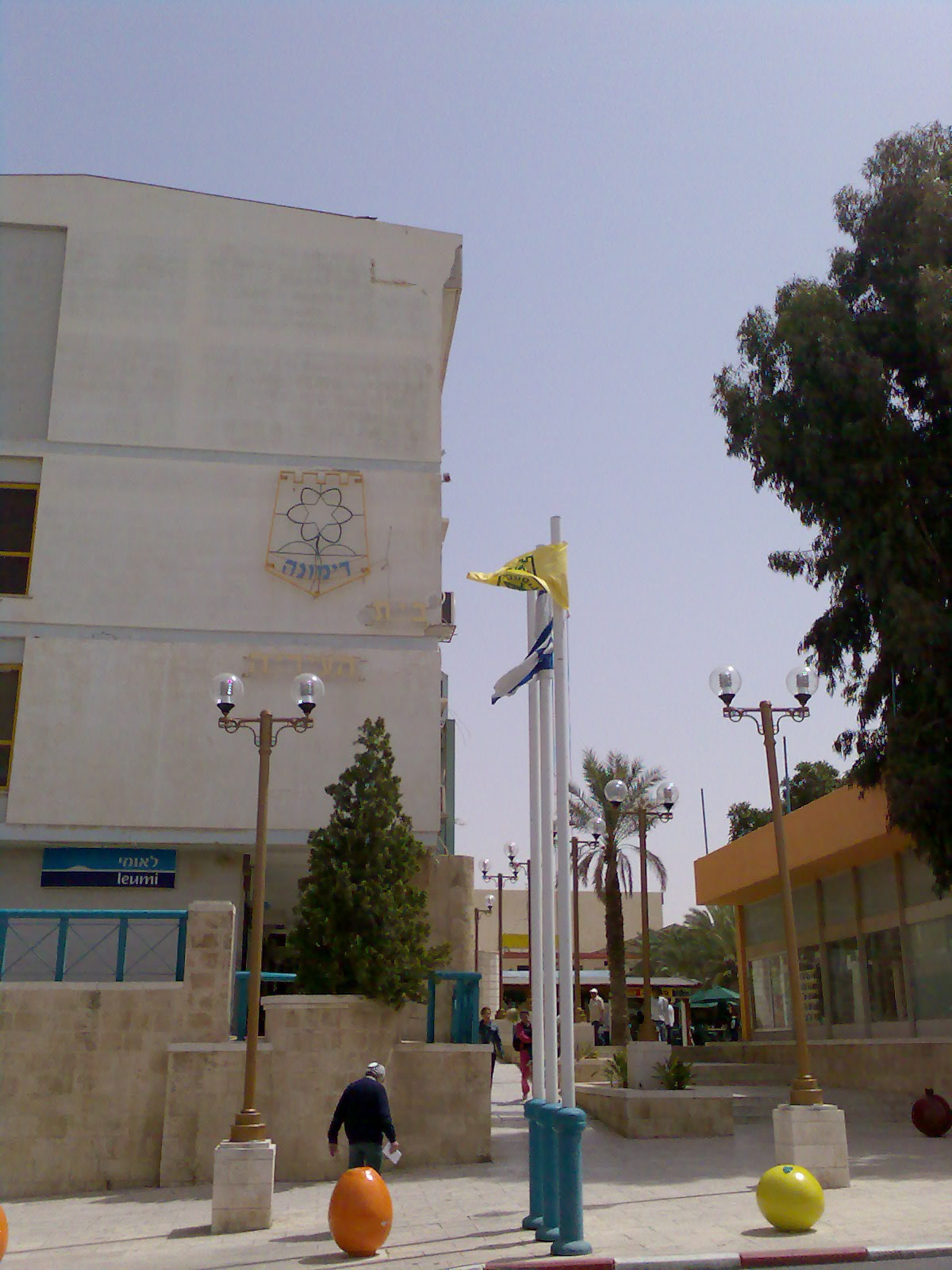 Hotel de Ville de Dimona